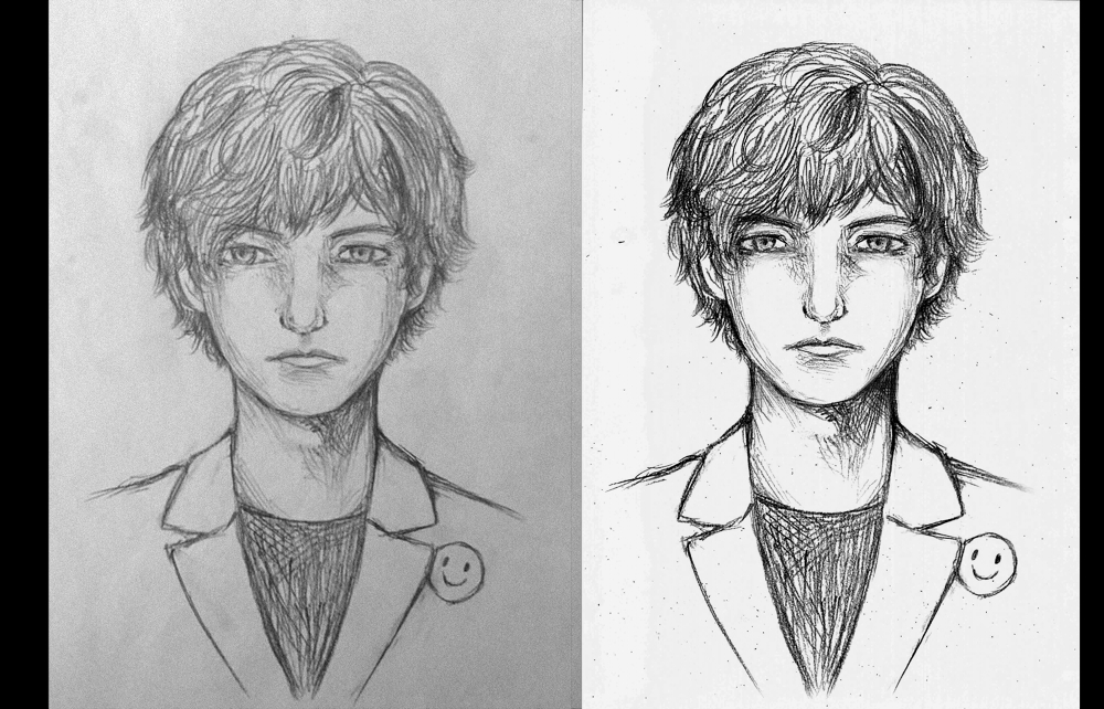 犯人樣貌素描